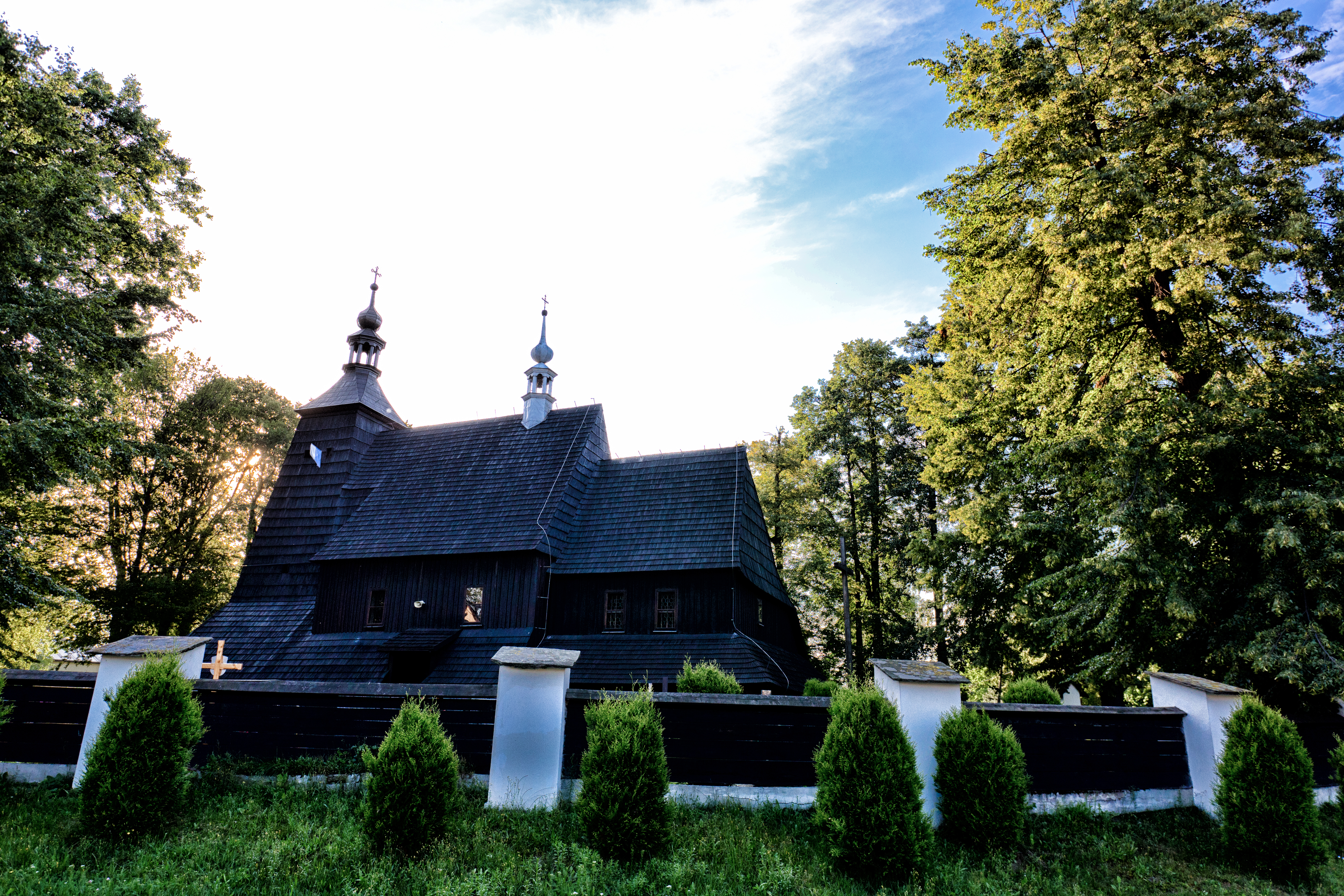 Grzawa, kościół par. p.w. św. Jana Chrzciciela, XVII w.